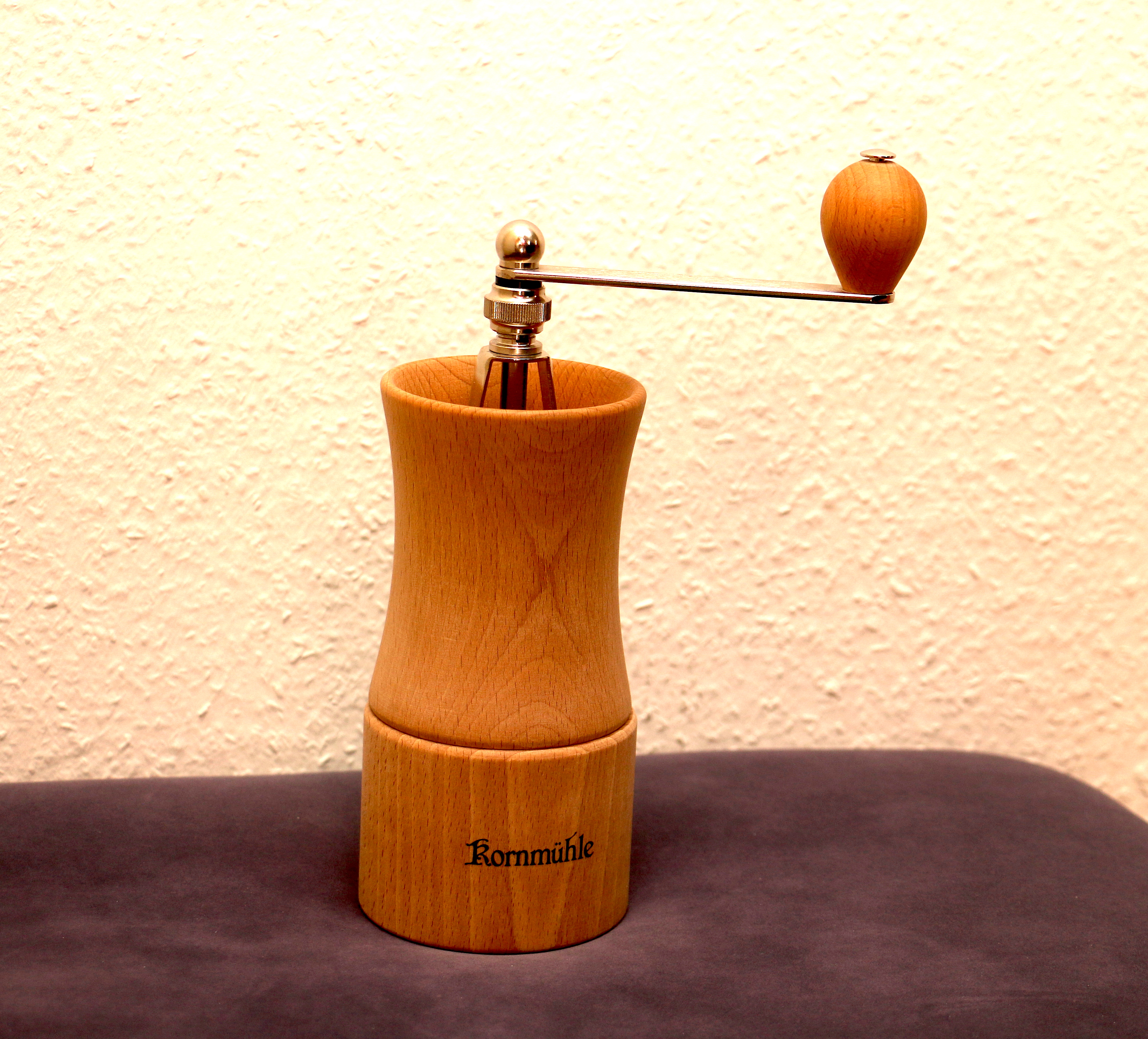 Handgetreidemühle